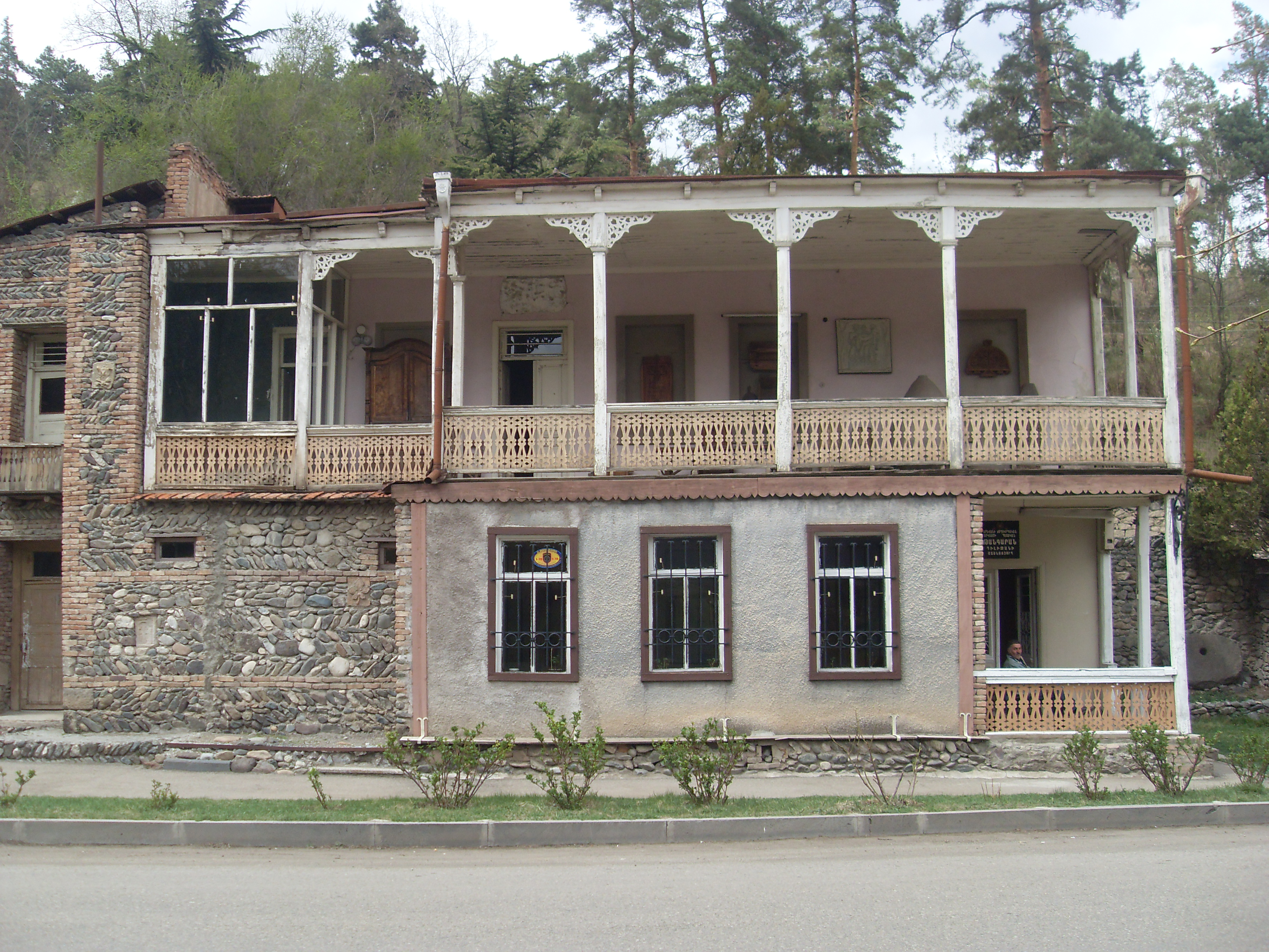 Բնակելի տուն, 19-րդ դ. վերջ, եղել է իշխանուհի Մարիամ Թումանյանի ամառանոցը: 1979-ից՝ ժողովրդական արվեստի թանգարանի Դիլիջանի մասնաճյուղի շենք: 3/5